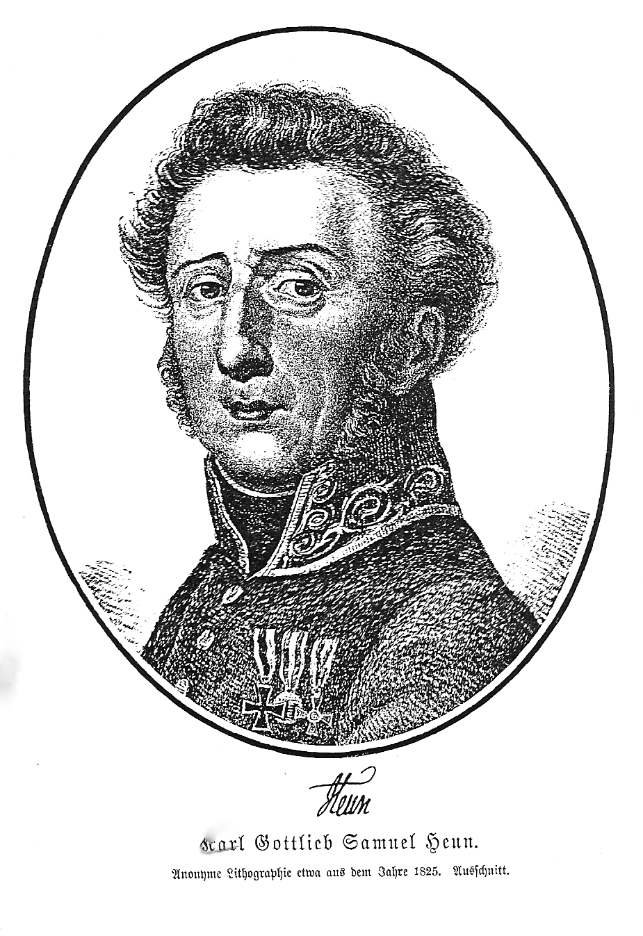 Das Bild stammt aus Bilderatlas zur Geschichte der deutschen Nationallitteratur von Gustav Könnecke. Zweite, verbesserte und vermehrte Auflage. Marburg: Elwert 1895. Das Bild ist gemeinfrei. Für Wikipedia eingescannt und zur Verfügung gestellt von --Goerdten 20:35, 25. Nov. 2006 (CET)